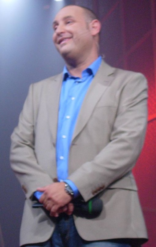 Tzvika Hadar